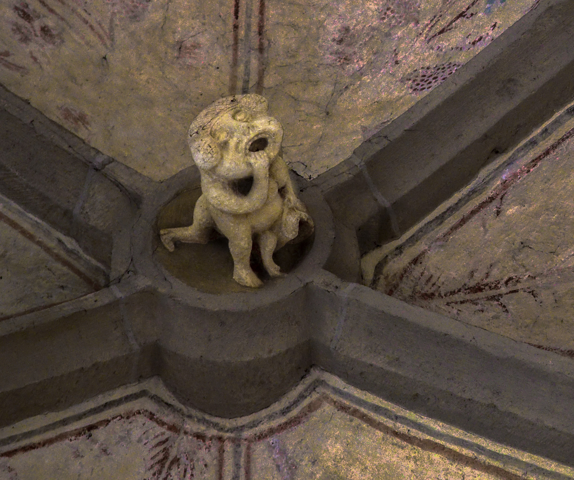 Mesum, Alte Kirche St. Johannes Baptist, Schlussstein (gedreht)